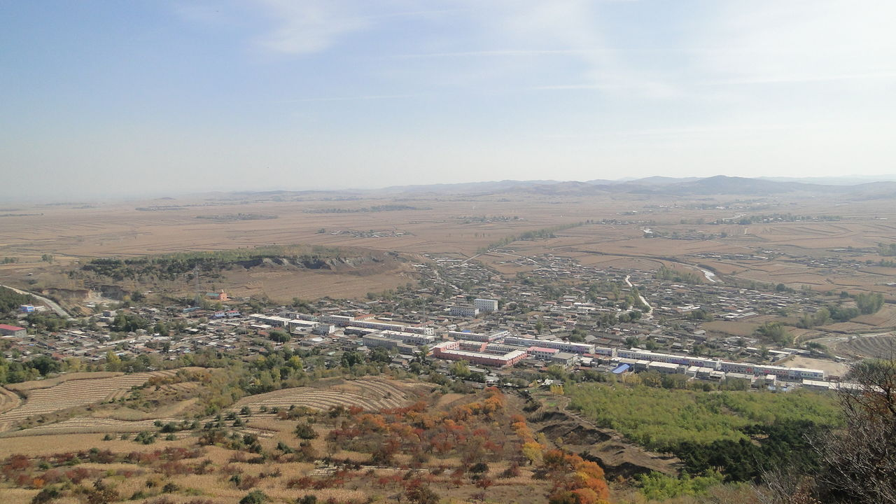 吉林省伊通满族自治县大孤山镇